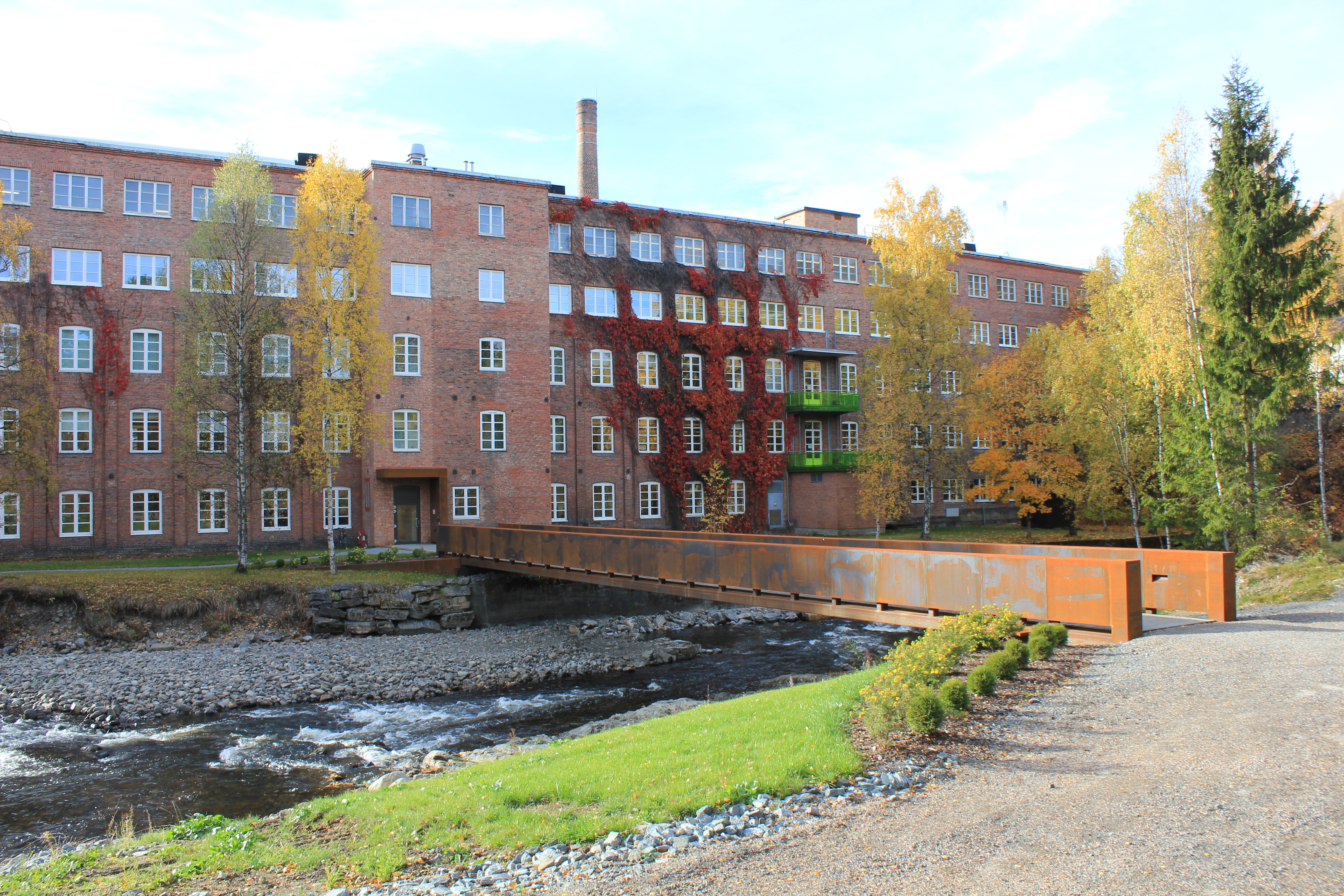 Stålbrua over Hunnselva til Mustad fabrikker på Gjøvik.